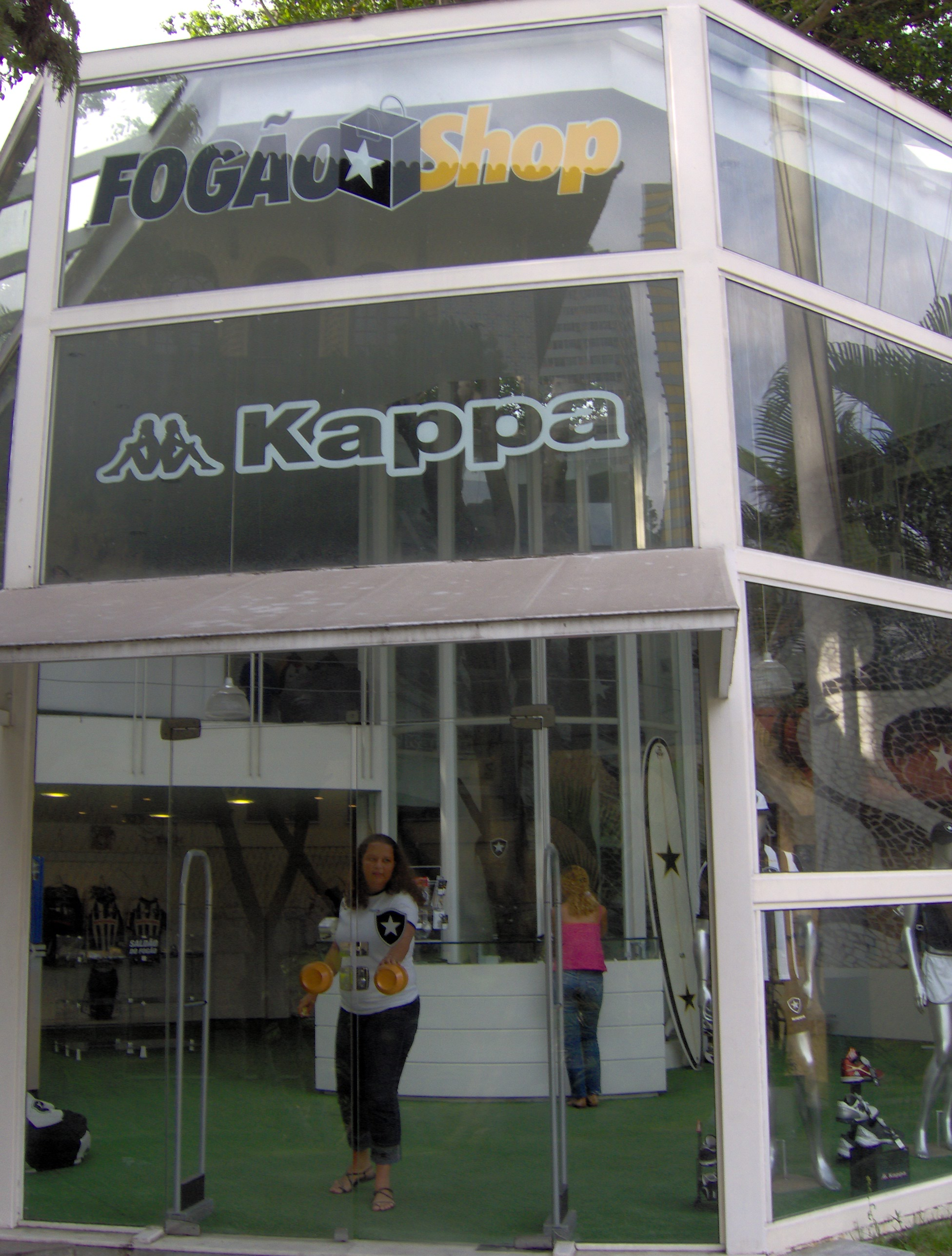 Foto da entrada da loja oficial do Botafogo de Futebol e Regatas chamada "Fogão Shop".